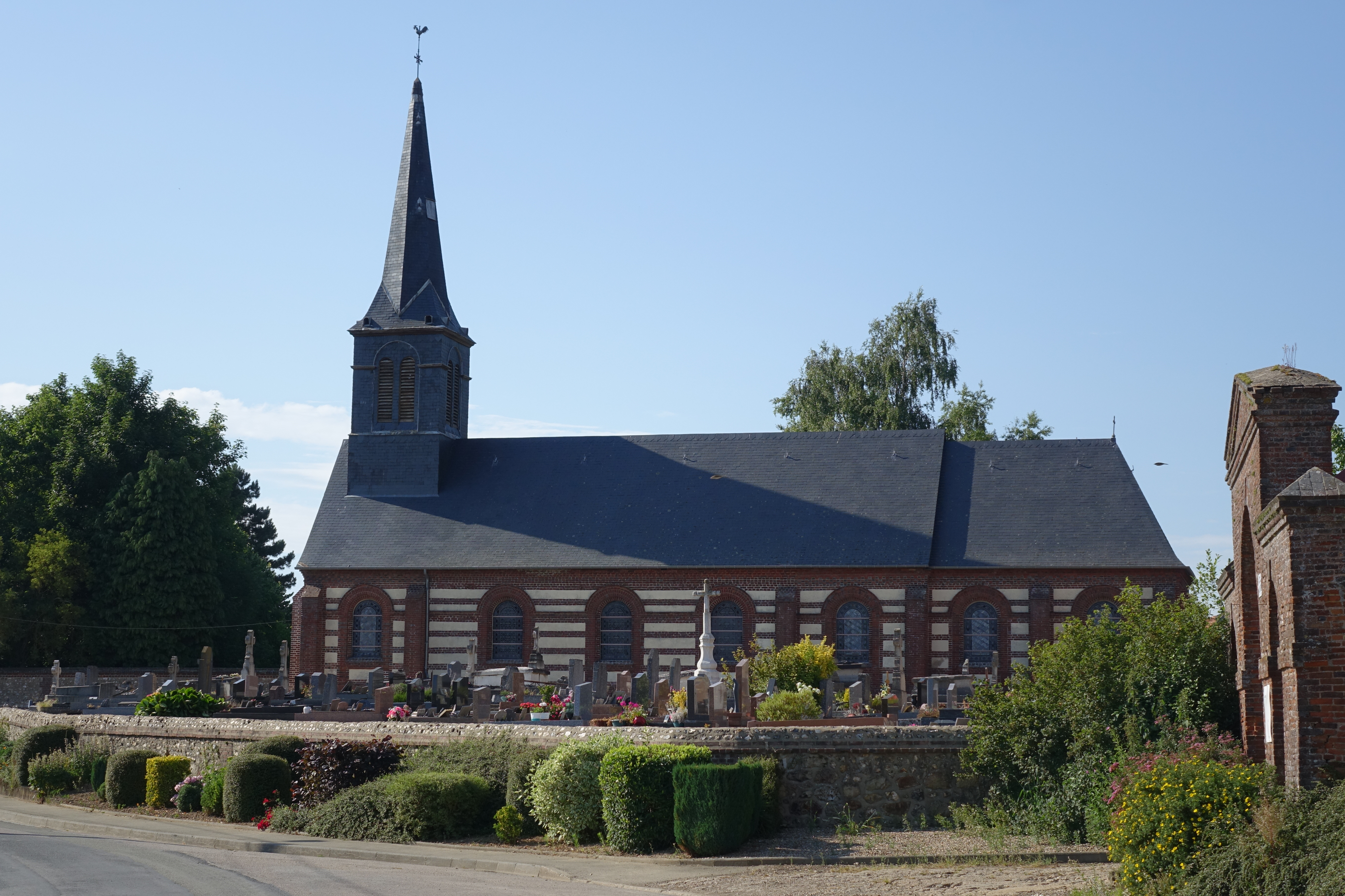 Église de Servaville-Salmonville, Seine-Maritime, France